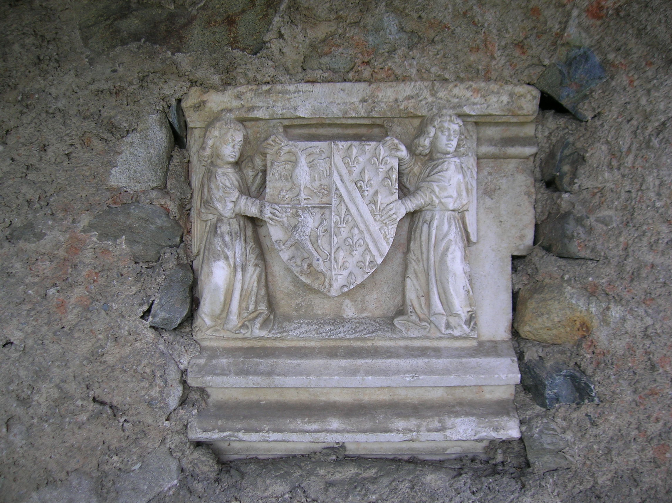 blason sculpté qui faisait partie du manteau d'une cheminée du château fort de Revel, aujourd'hui inclu dans le mur du lavoir. Revel, Isère, AuRA, France.